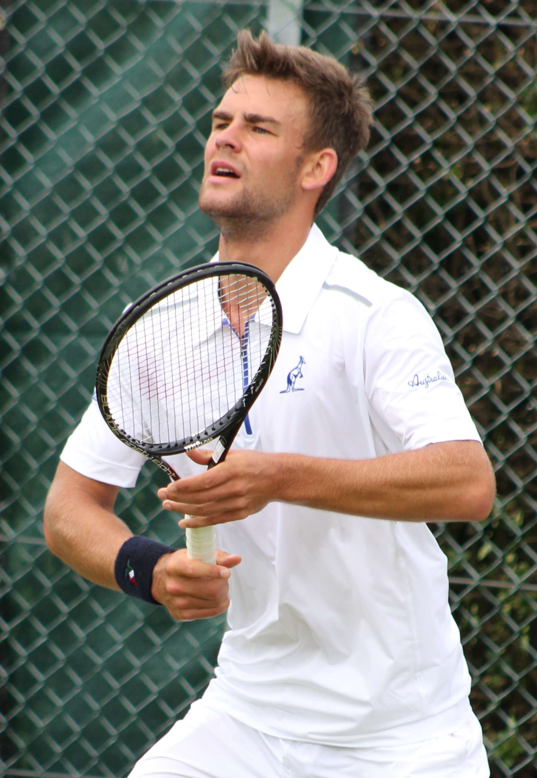 Grigelis WMQ14 (12)